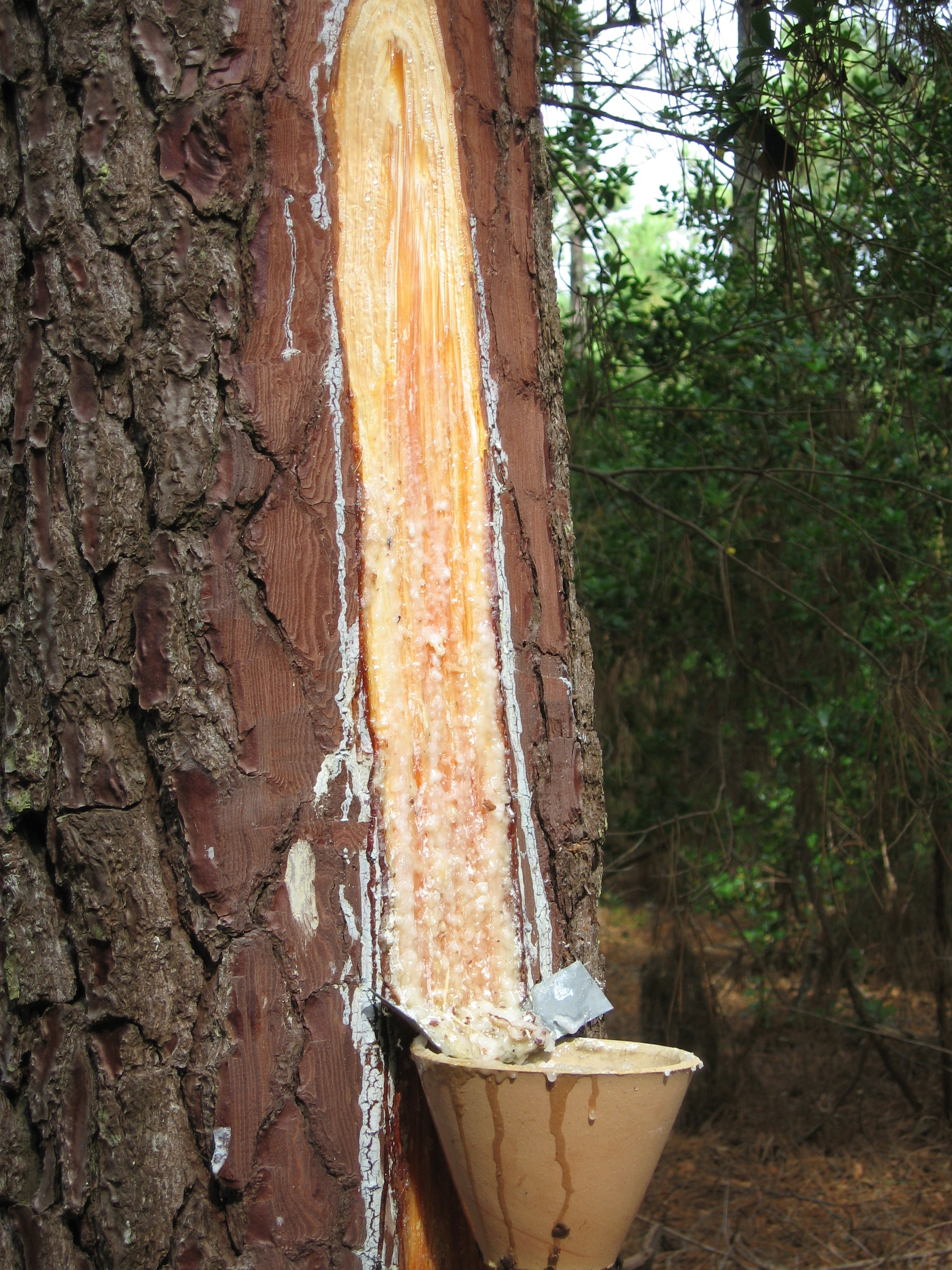 Care sur un pin gemmé (La Teste de Buch, Gironde, Aquitaine, France)